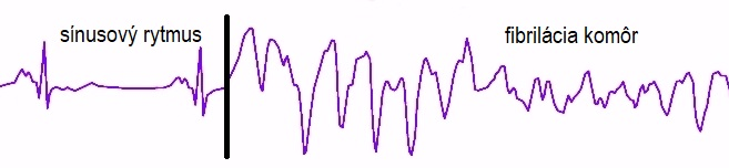 Komorová fibrilácia, spustená komorovou extrasystolou typu "R na T" (extrasystolou, ktorá nasadá na T vlnu predchádzajúceho cyklu)